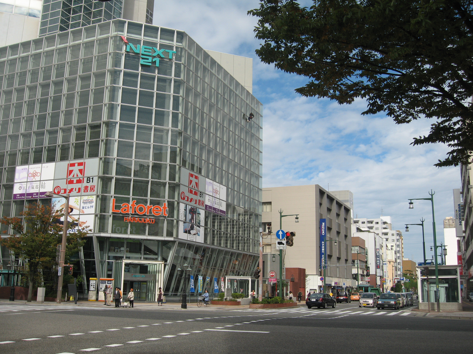 新潟県新潟市中央区。西堀通6番町の画像。